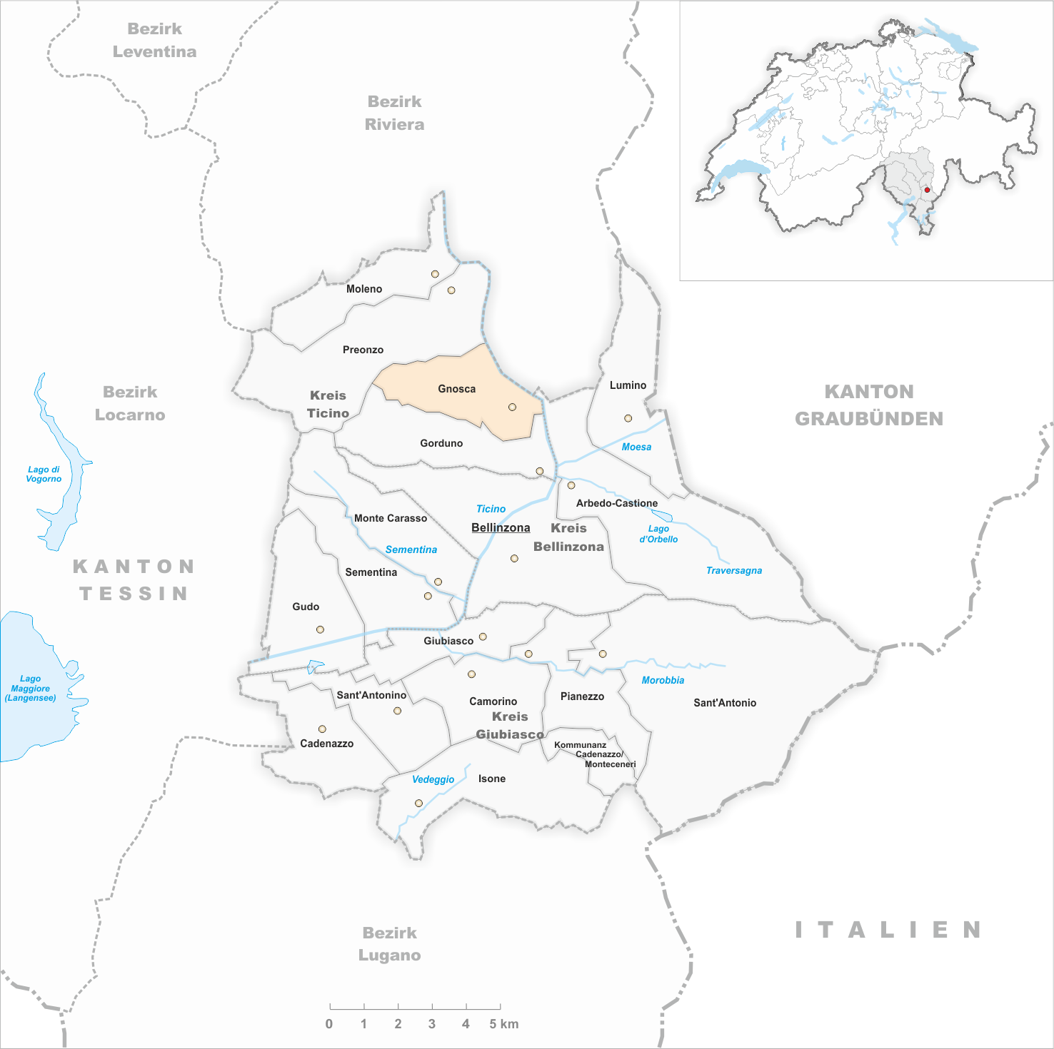 Municipality Gnosca